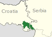 Српски (ћирилица): Вуковарско-сремска жупанија- Спачва.